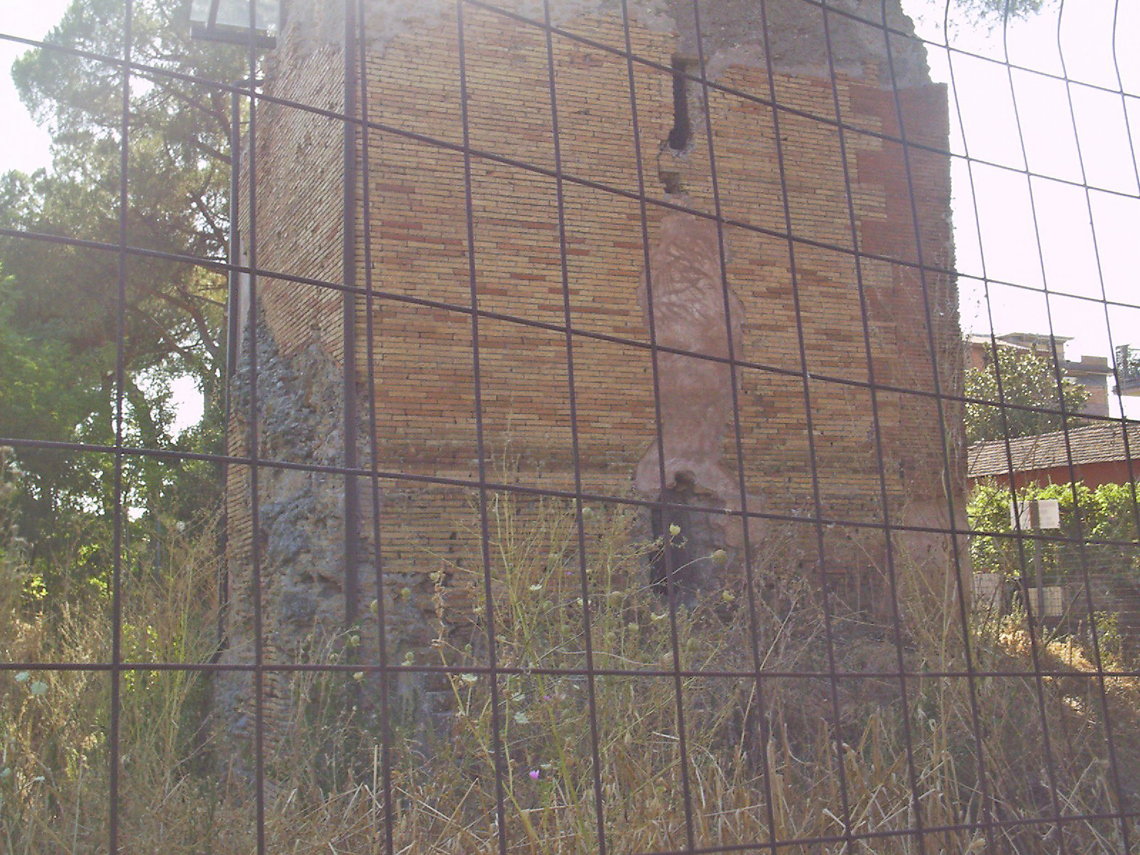 Torre della Cecchina